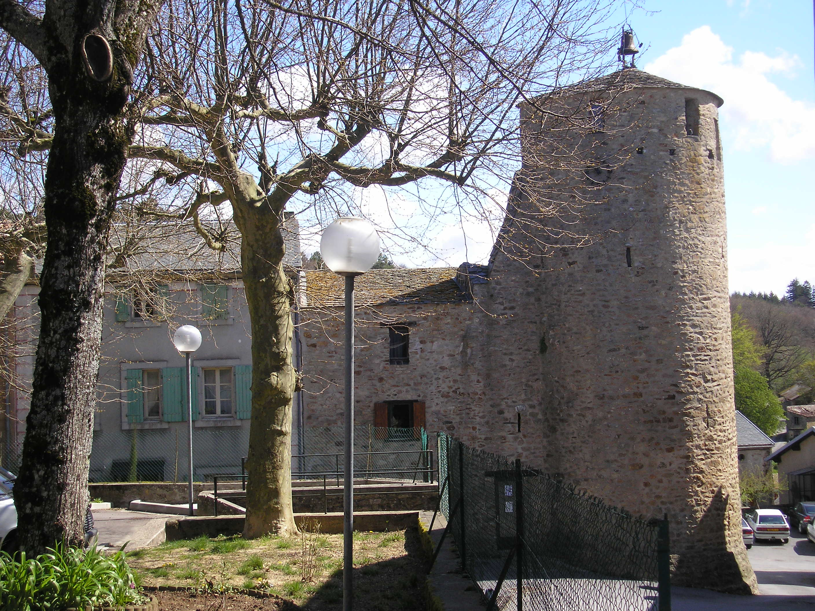 La tour de l'horloge faisant partie de l'ancien château de Fontiers-Cabardès en avril 2009.